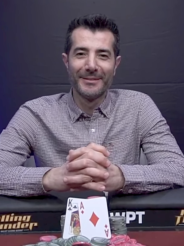 Erkut Yilmaz nach seinem Sieg bei der WPT Rolling Thunder